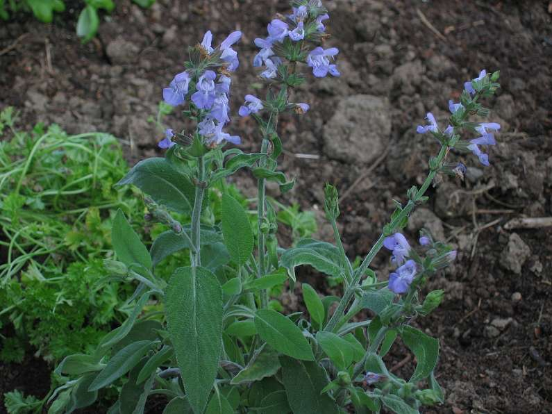 Heilsalbei (Salvia officinalis), Nahaufnahme.